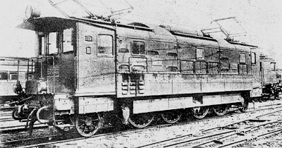 Nicht-Antriebseite der JNR ED54-2